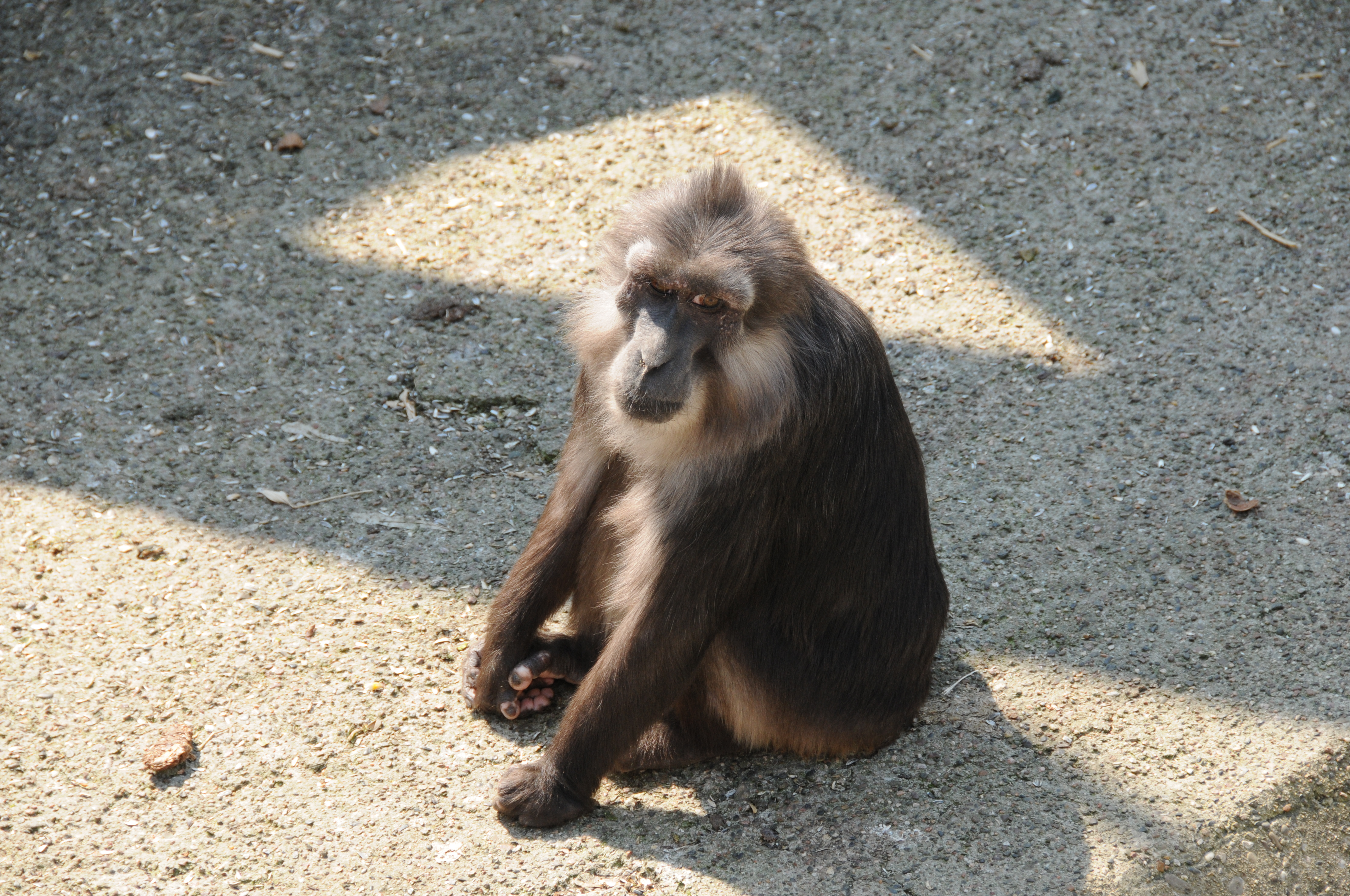 Macaque de Tonkean (Macaca tonkeana)